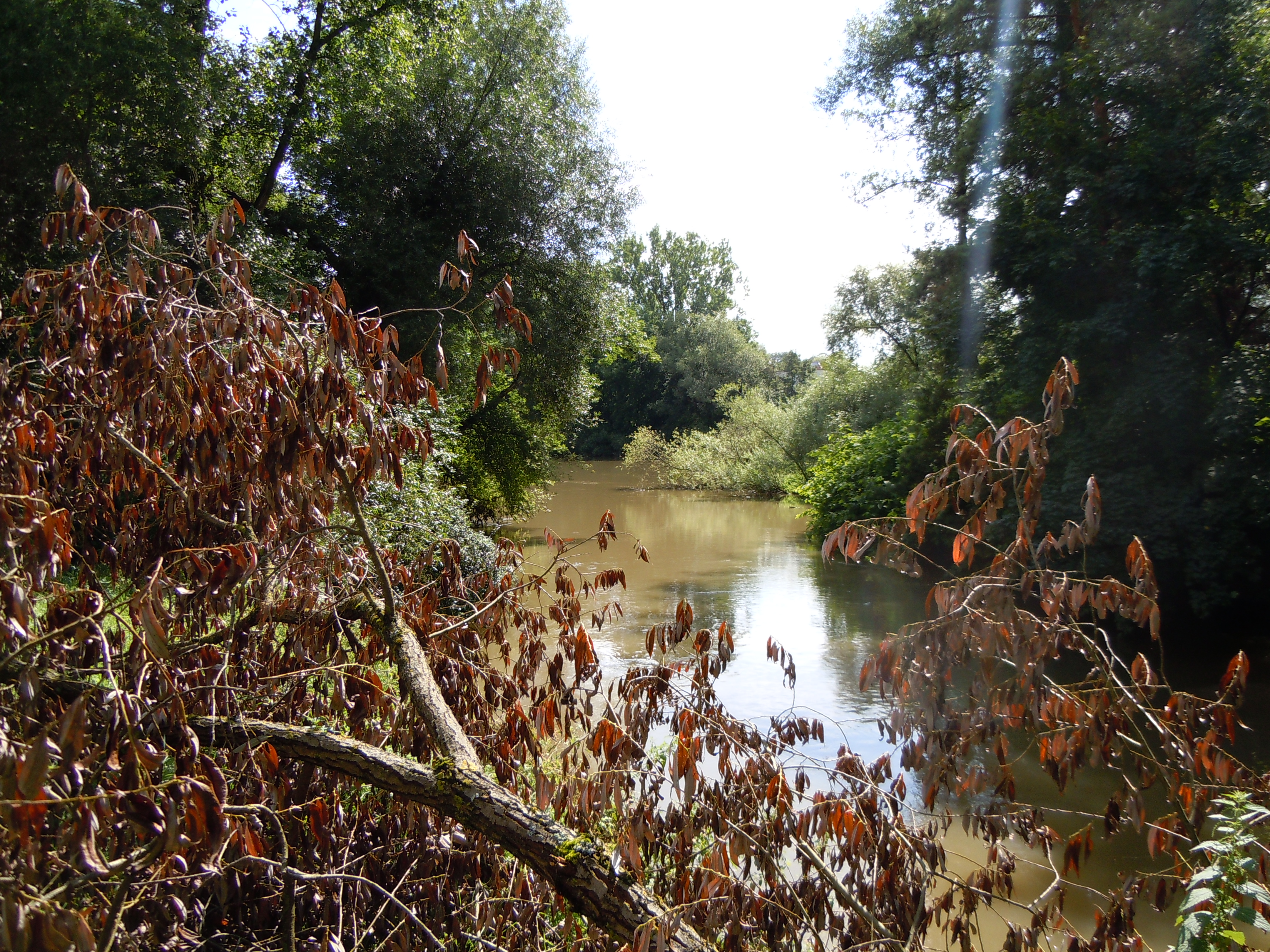 Die Mündung des Hummelkanals in den Neckar (hinten von rechts nach links). Die Neckarinsel liegt rechts.